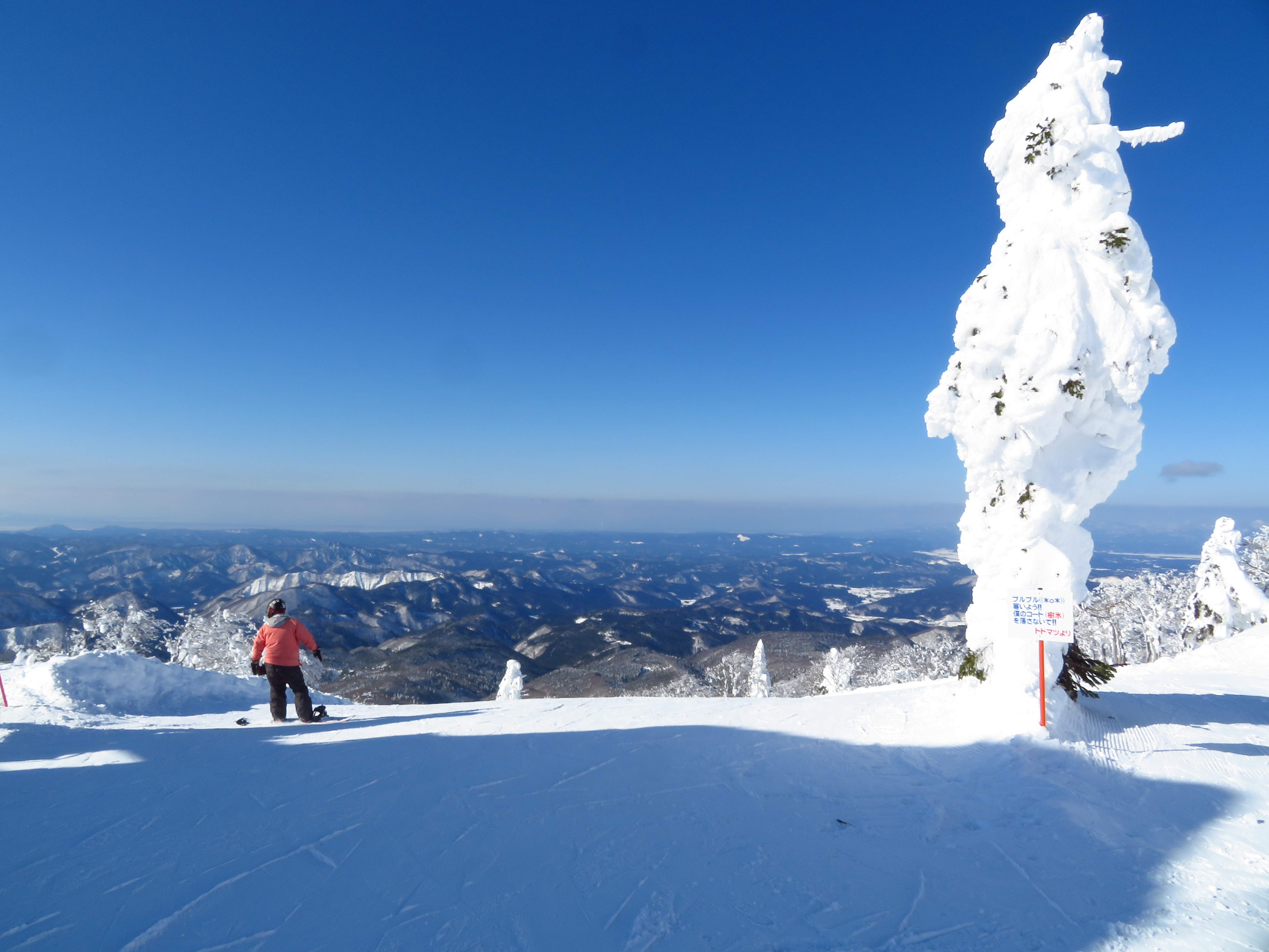 森吉山 阿仁スキー場 Canon PowerShot SX720 HS